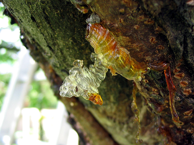 Beschreibung: Baumharz des Kirschbaums / resin of cherry Fotograf: Darkone, 28. Juli 2004